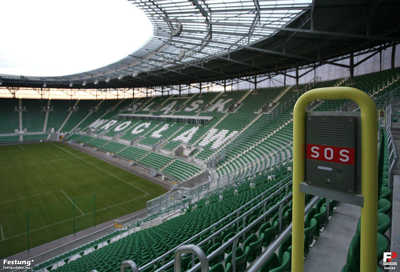 To zdjęcie eksponuje ważny szczegół stadionu: bramkę SOS na wypadek "W". Oprowadzający mówił o ośmiominutowym czasie ewakuacji pełnego kibiców obiektu. Jakoś to obliczono. Obyśmy nie musieli tego sprawdzać. PS. To rozmycie dalszego planu było absolutnie zamierzone - ustawienie "portret".